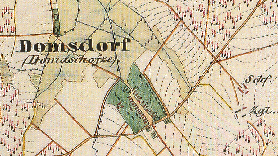 Domsdorf, Ortsteil von Drebkau, Lkr. Spree-Neiße, Brandenburg, Ausschnitt aus dem Urmesstischblatt 4351 Drebkau von 1846